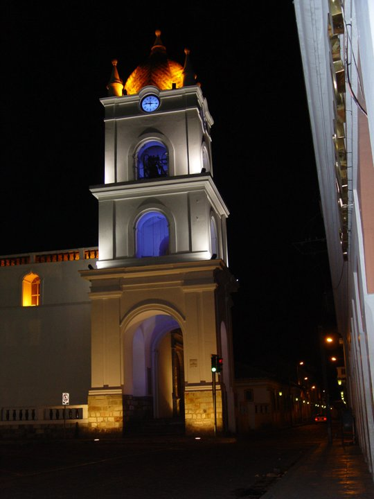 Catedral de Latacunga, capital de la provincia de Cotopaxi.